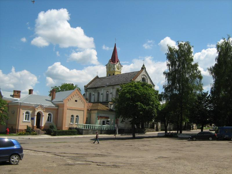 Центральная площадь г.Старый Самбор